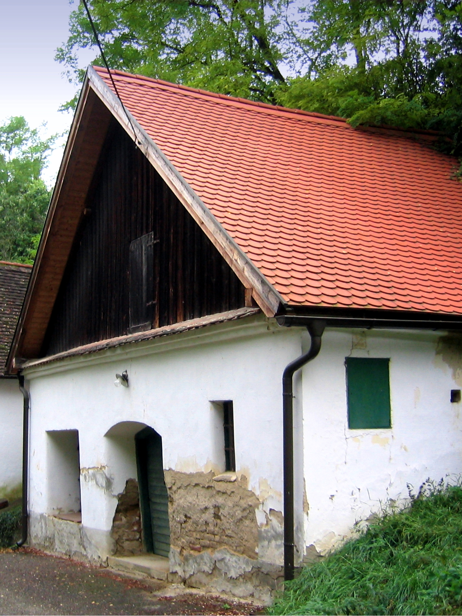 Mühlbergkellergasse Objekt 10